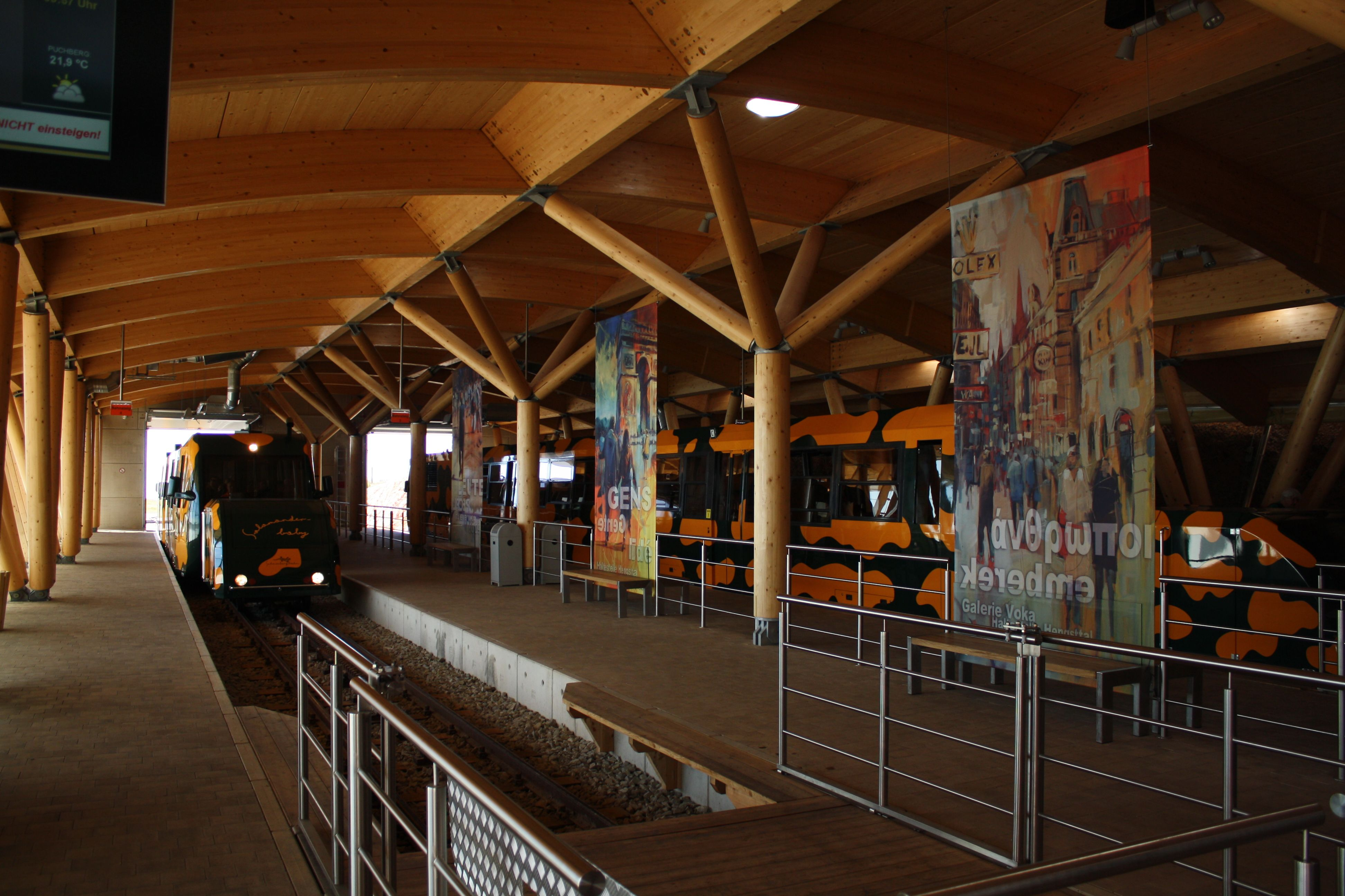 Bergbahnhof am Schneeberg in Niederösterreich